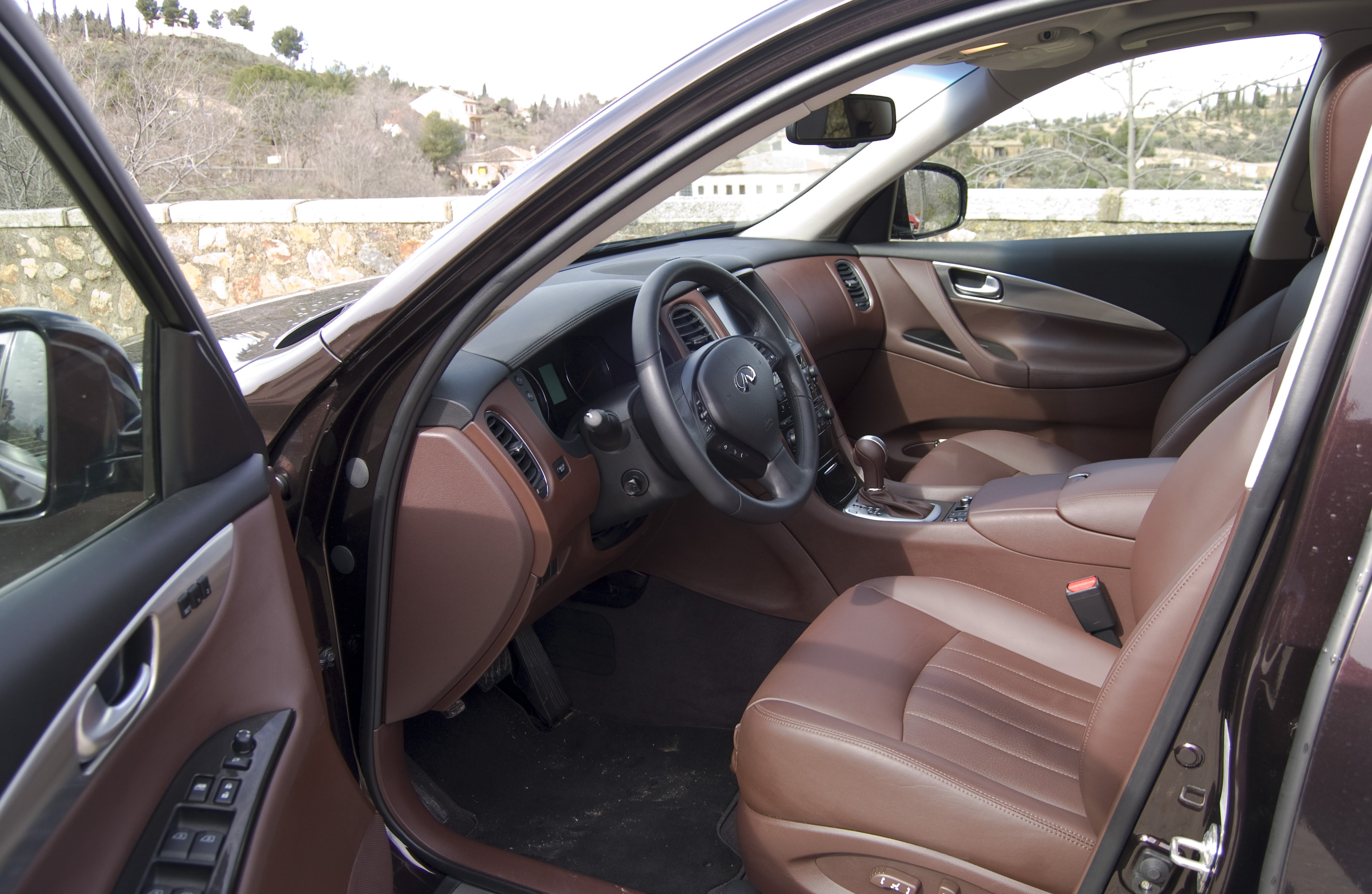 Prueba del Infiniti EX37 y Photoshoot en el Puerto de la Morcuera en la sierra madrileña. Prueba en Diariomotor